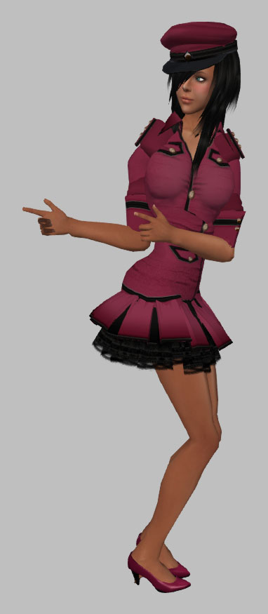 山上たつひこのギャグ漫画『がきデカ』の登場人物・こまわり君がとる「死刑」のポーズ